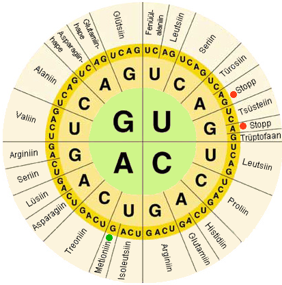 Pildil on kujutatud üht võimalikku varianti geneetilise koodi tabelist, nn. koodipäikest. Keskmine ring kujutab endast koodoni esimest nukleotiidi, teine ring teist ja kolmas ring kolmandat. Välises ringis on toodud koodonitele vastavate aminohapete nimetused. Rohelise tärniga on tähistatud initsiaatorkoodon, punastega stoppkoodonid.